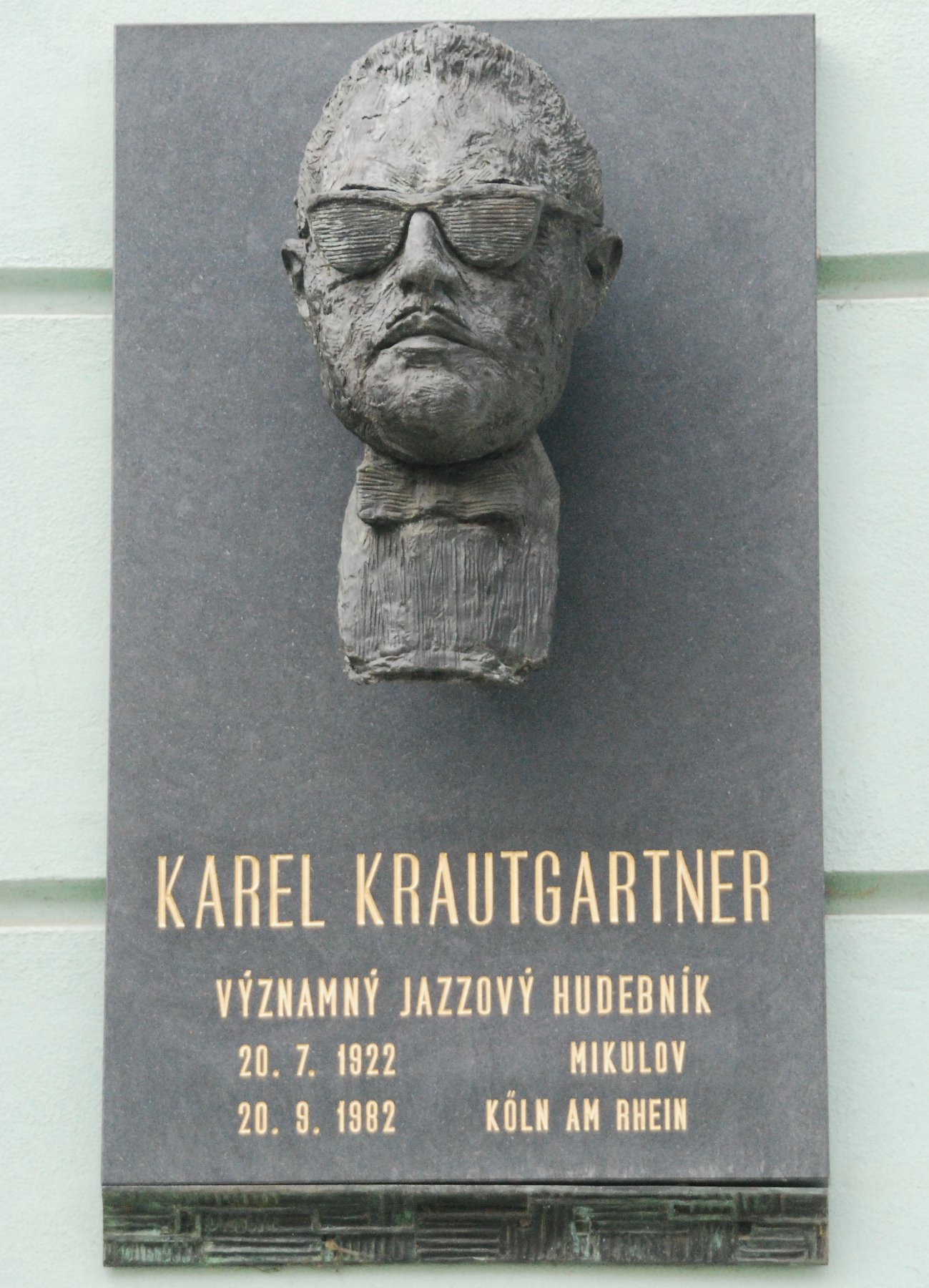 Pamětní deska Karla Krautgartnera v Mikulově